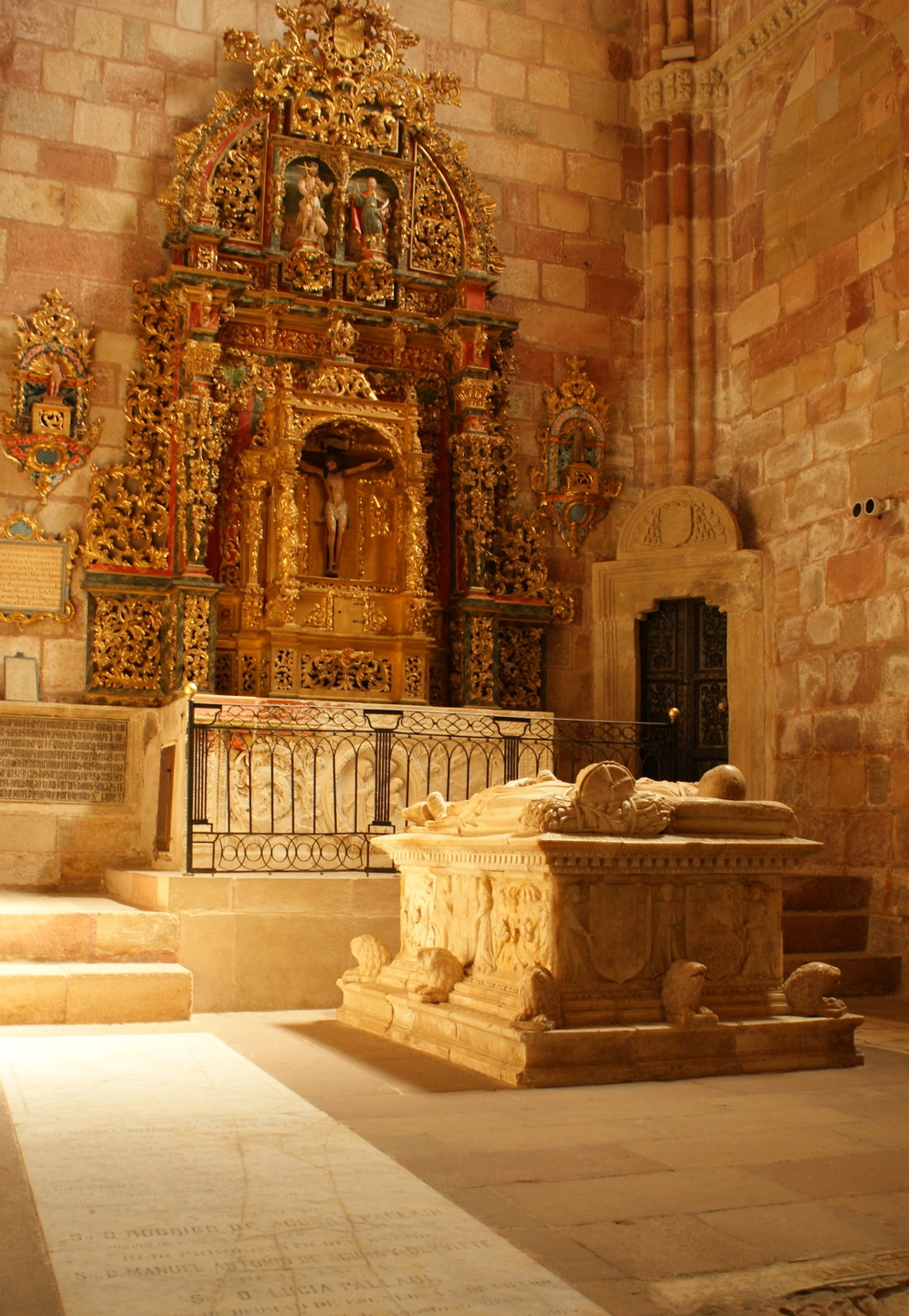 Conocida como la Capilla del Doncel, su denominación es Capilla de San Juan y Santa Catalina. Es la más importante de la catedral, no solo por albergar los féretros de la familia Vázquez de Arce, sino por el conjunto artístico escultural que acoge. La Catedral de Sigüenza está dedicada a Santa María la Mayor, patrona de la ciudad de Sigüenza. Tuvo su origen en enero de 1124, cuando el obispo Bernardo de Agén (1080–1152) reconquistó la ciudad a los musulmanes, en tiempos del reinado de Doña Urraca, hija de Alfonso VI. Guadalajara, Comunidad Autónoma de Castilla-La Mancha